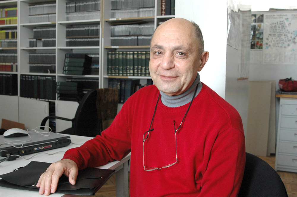 2007 Երևան